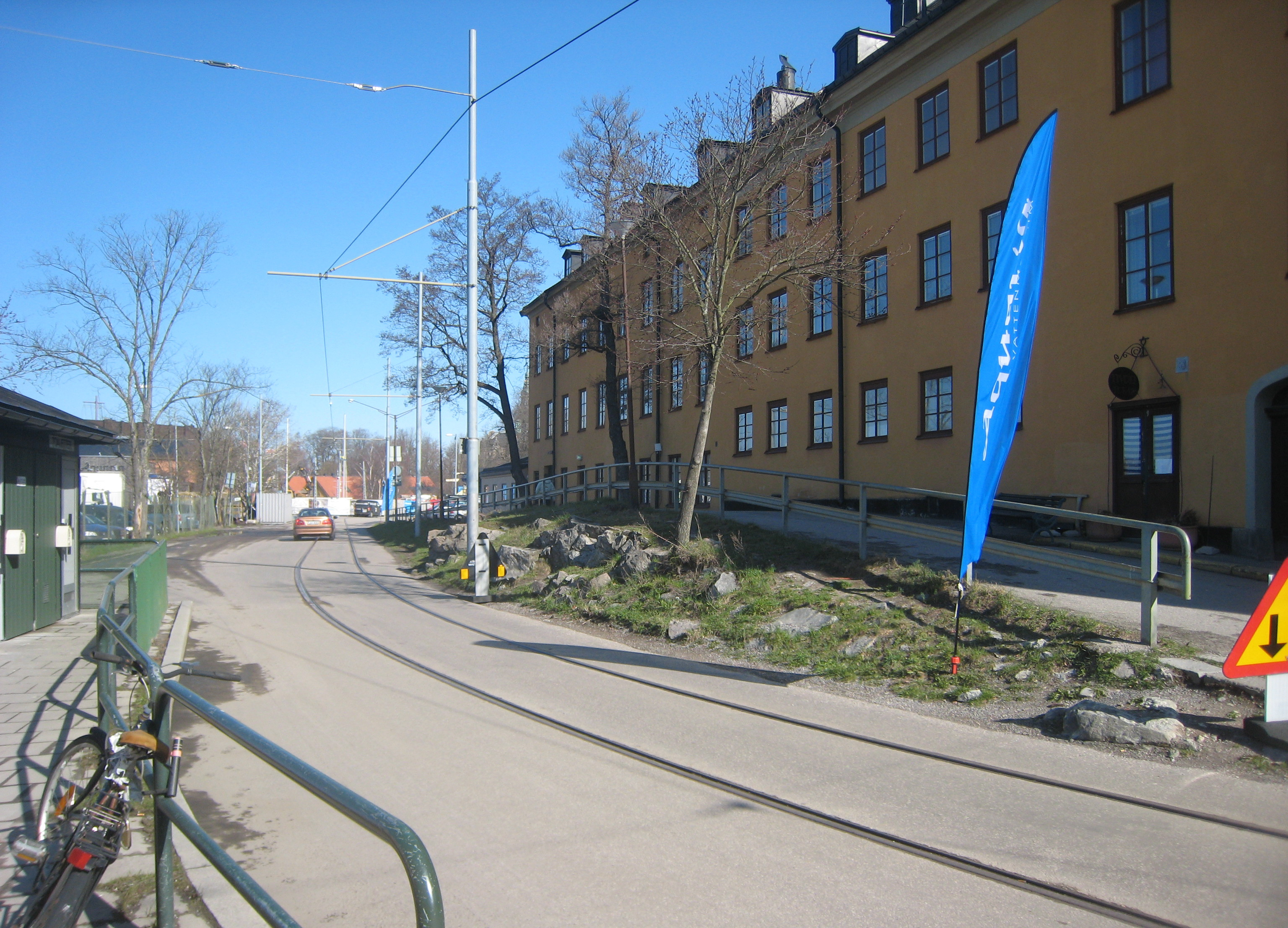 Falkensbergsgatan. Kvarteret Konsthallen 14.